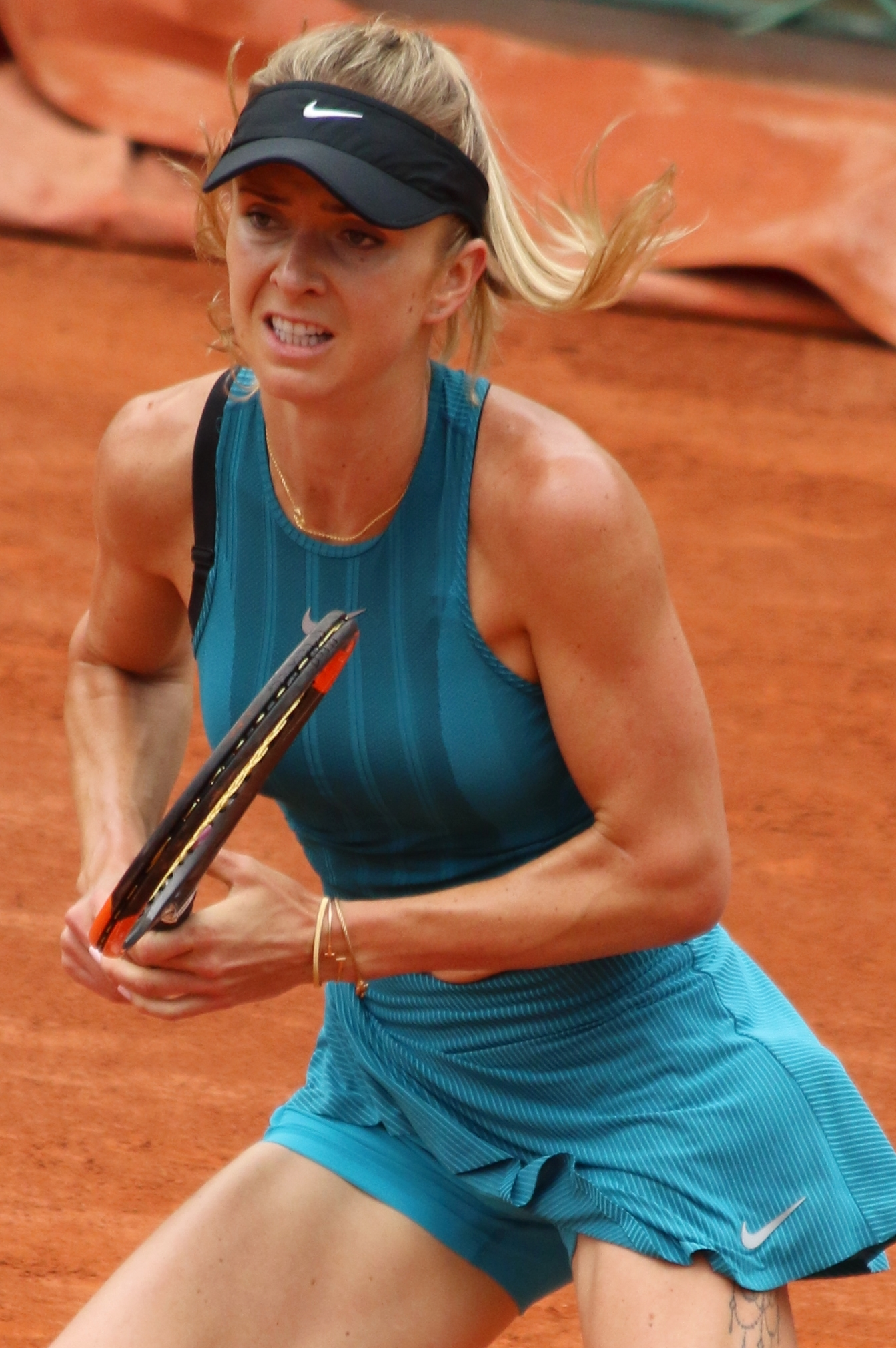 Svitolina RG18 (86)